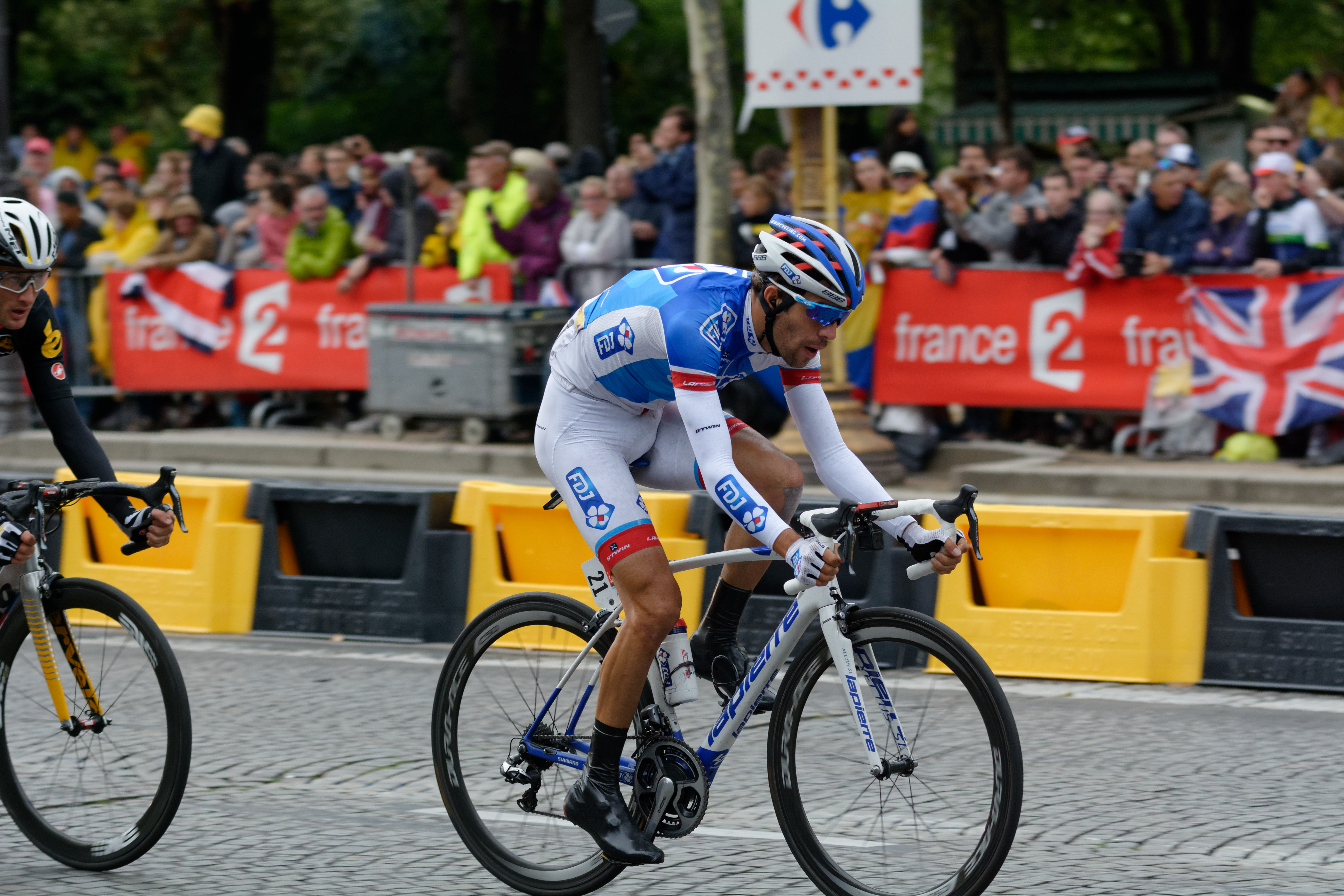 D71_2787_DxO